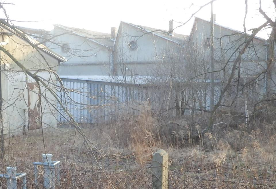 Produktionshalle der ehemaligen Ikaria-Werke, erbaut vermutlich 1936, fotografiert von öffentlichem Straßenland